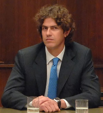 Martín Lousteau como Ministro de Economía de la República Argentina.